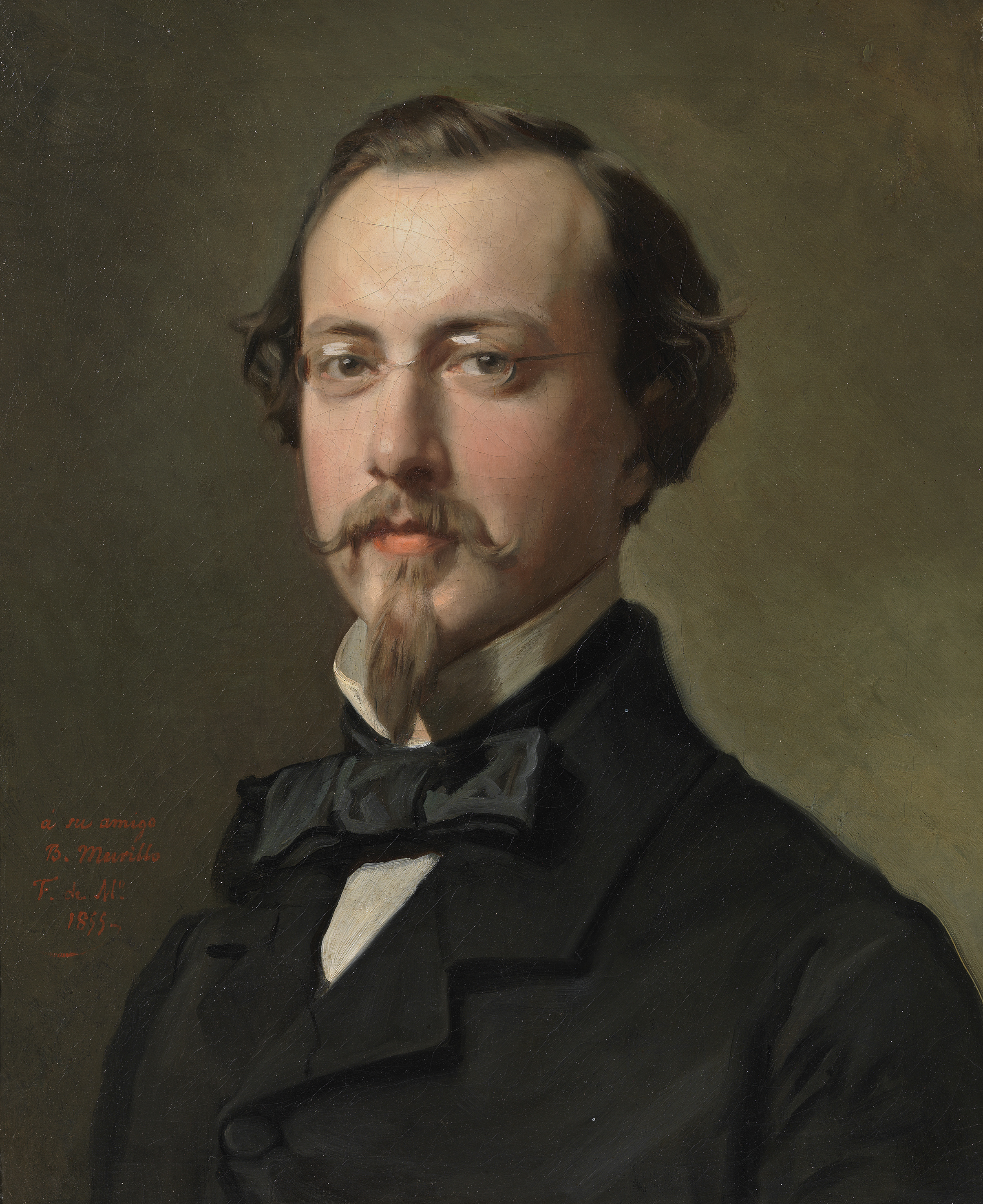 Retrato de busto en el que aparece el pintor retratado a los 28 años, cuando ya gozaba de una gran amistad con Federico de Madrazo. De frente, ligeramente girado hacia la izquierda, con lentes, amplio bigote y perilla. Sobre la chaqueta y resaltando sobre el blanco de la camisa, un semiabocetado lazo realizado con amplias pinceladas que contrastan con el acabado dibujístico del rostro. El brillo de los lentes confiere a la mirada una intensidad especial, reflejo de la sensibilidad e inteligencia del "gran Benito" como el propio Federico tantas veces le apodó a lo largo de su vida, quizás en contraposición al jocoso "Murillo el malo" en boca de sus también grandes amigos Palmaroli y Rosales (Texto extractado de Gutiérrez, A. en: Artistas pintados. Retratos de pintores y escultores del siglo XIX en el Museo del Prado, Museo del Prado, 1997, p. 80).